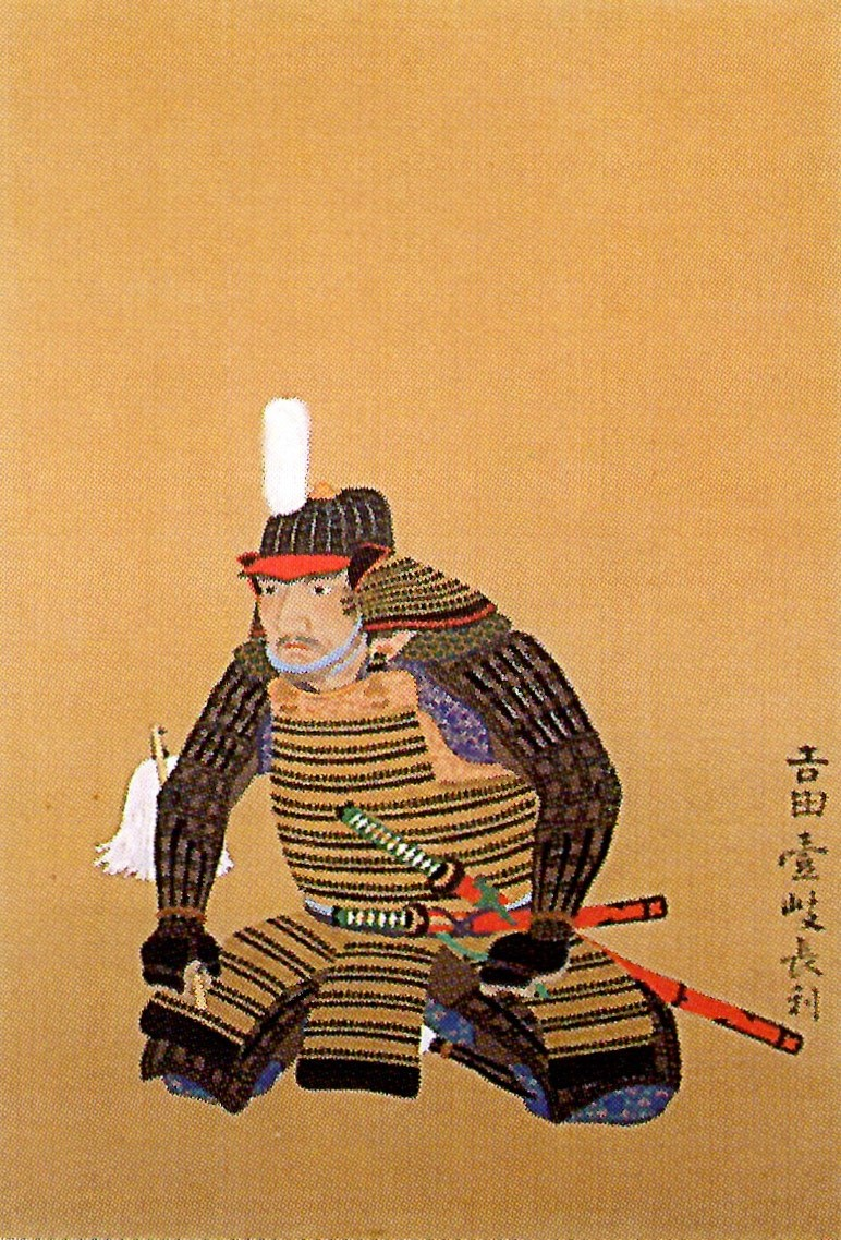 吉田長利の肖像。